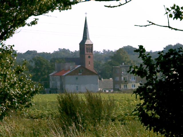 Damno, widok miejscowości